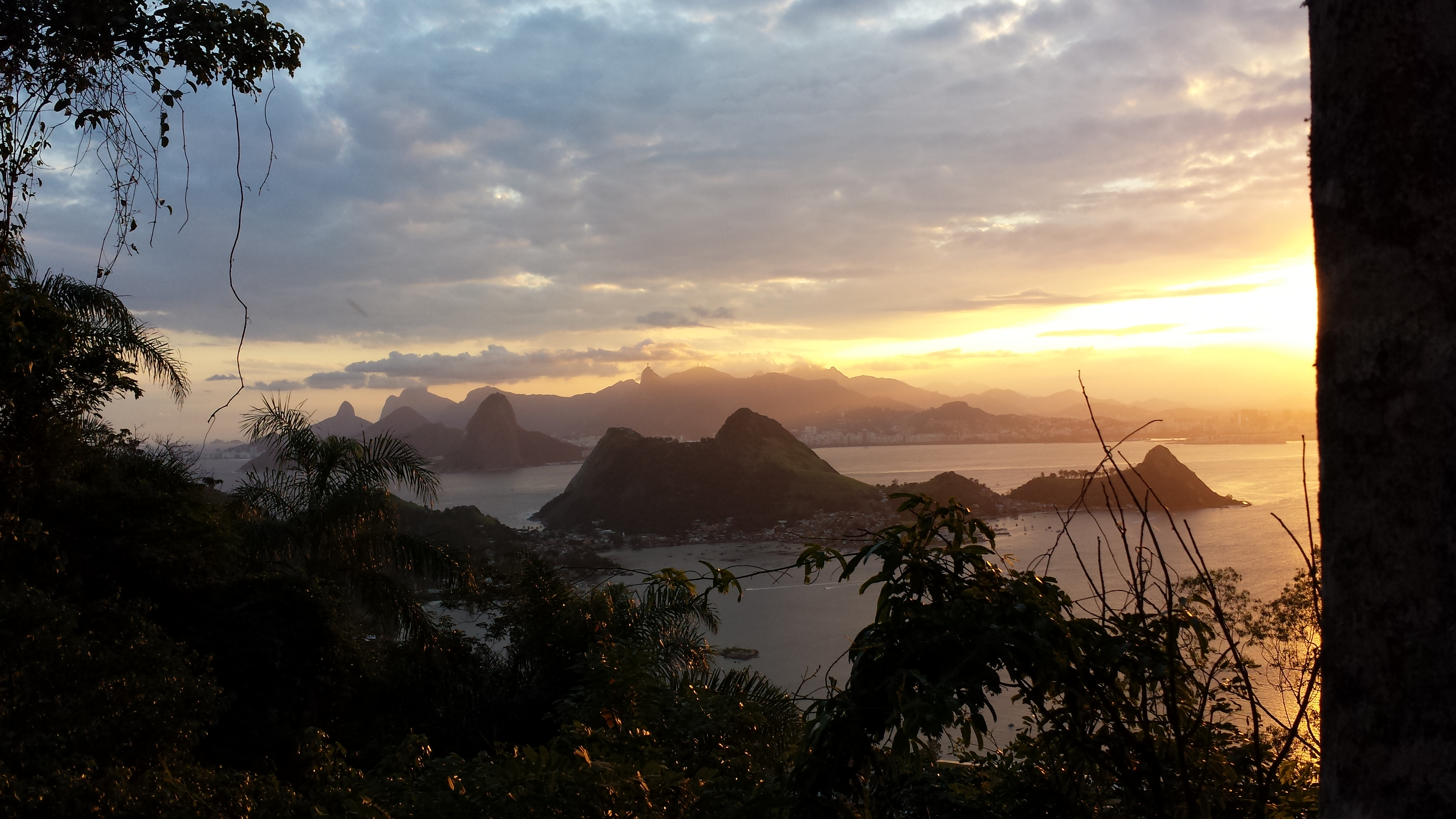 Enquanto todos aguardam o pôr-do-sol na rampa do Parque da Cidade, o cantinho ao lado do restaurante permanece vazio e meio esquecido, revelando entre as árvores essa bela visão.